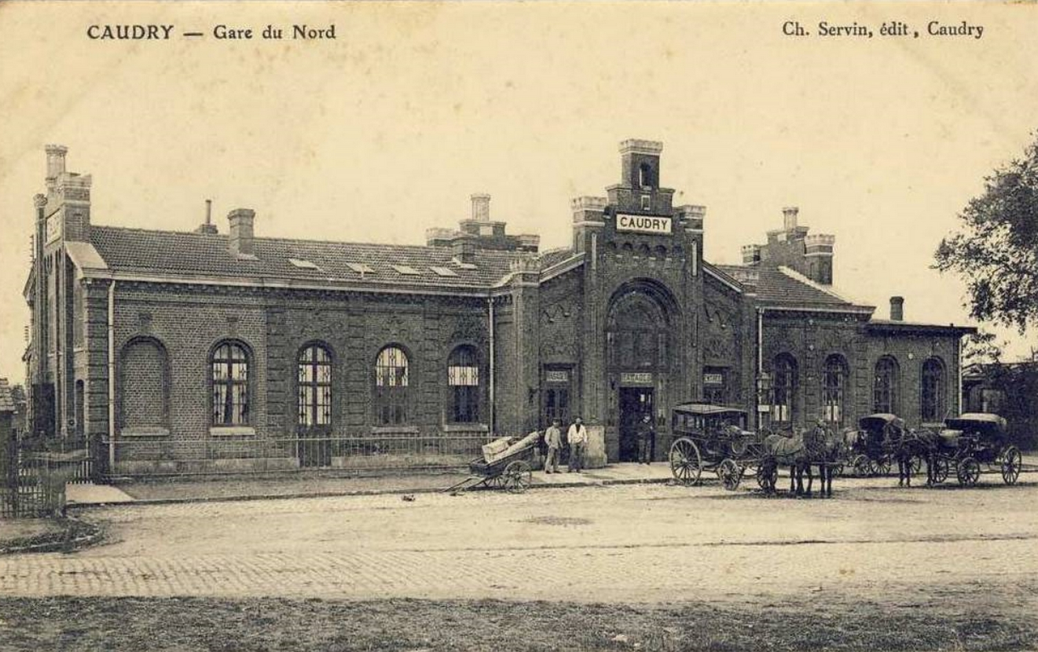 Gare de Caudry, Nord, Nord-Pas-de-Calais, France.